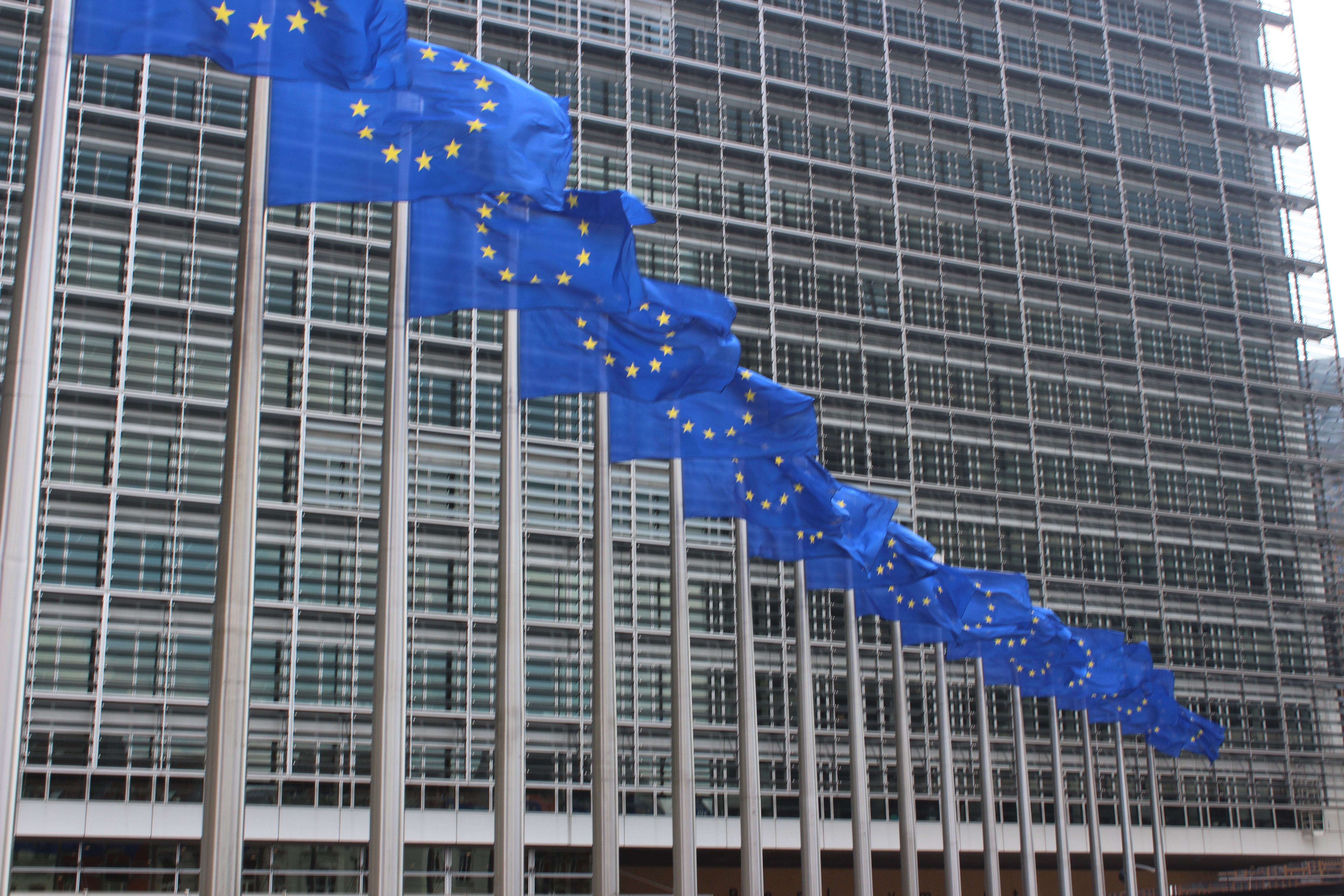 Colonne de drapeaux devant la commission européenne à Bruxelles